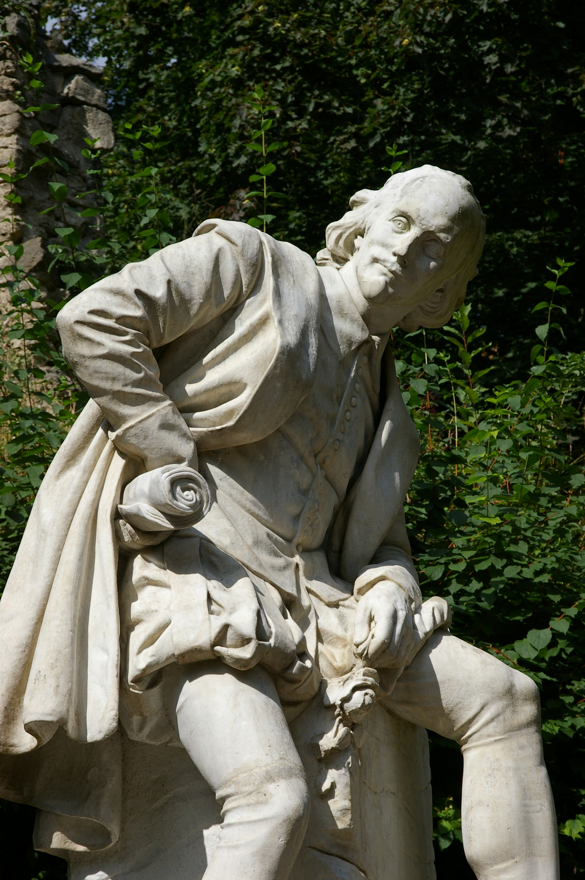 Shakespearedenkmal in Weimar (nachdenklich)